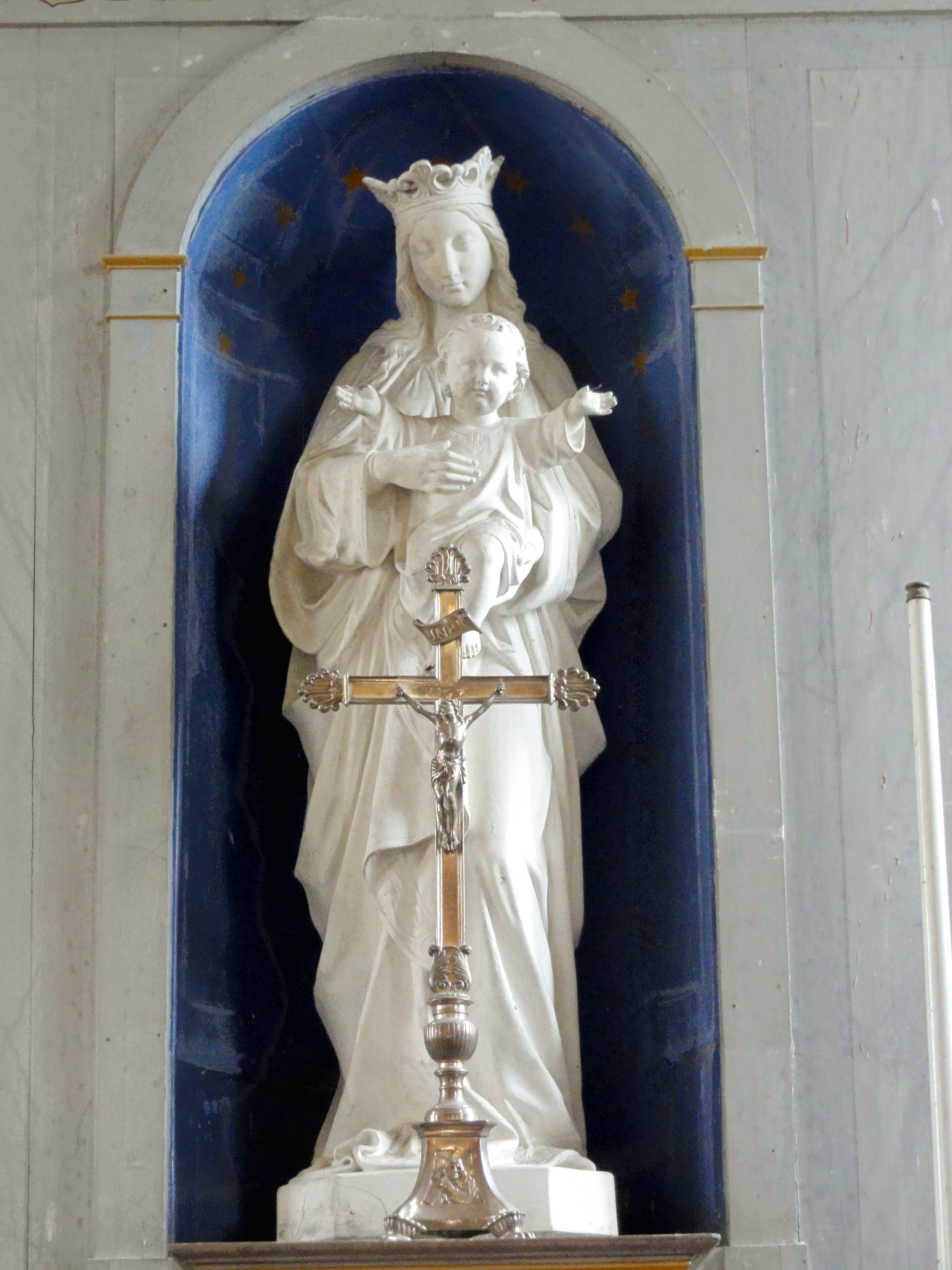 Vierge à l'Enfant.